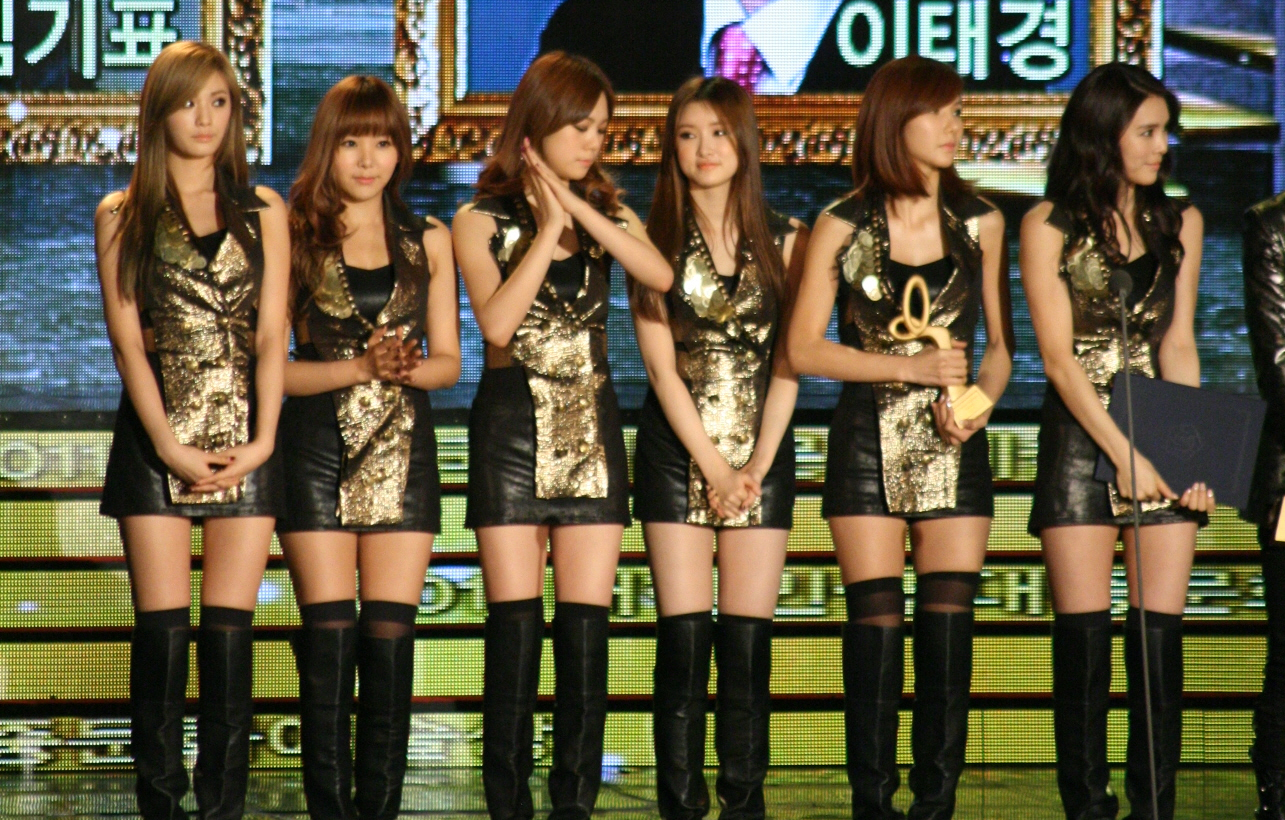 2011대한민국대중문화예술상 257